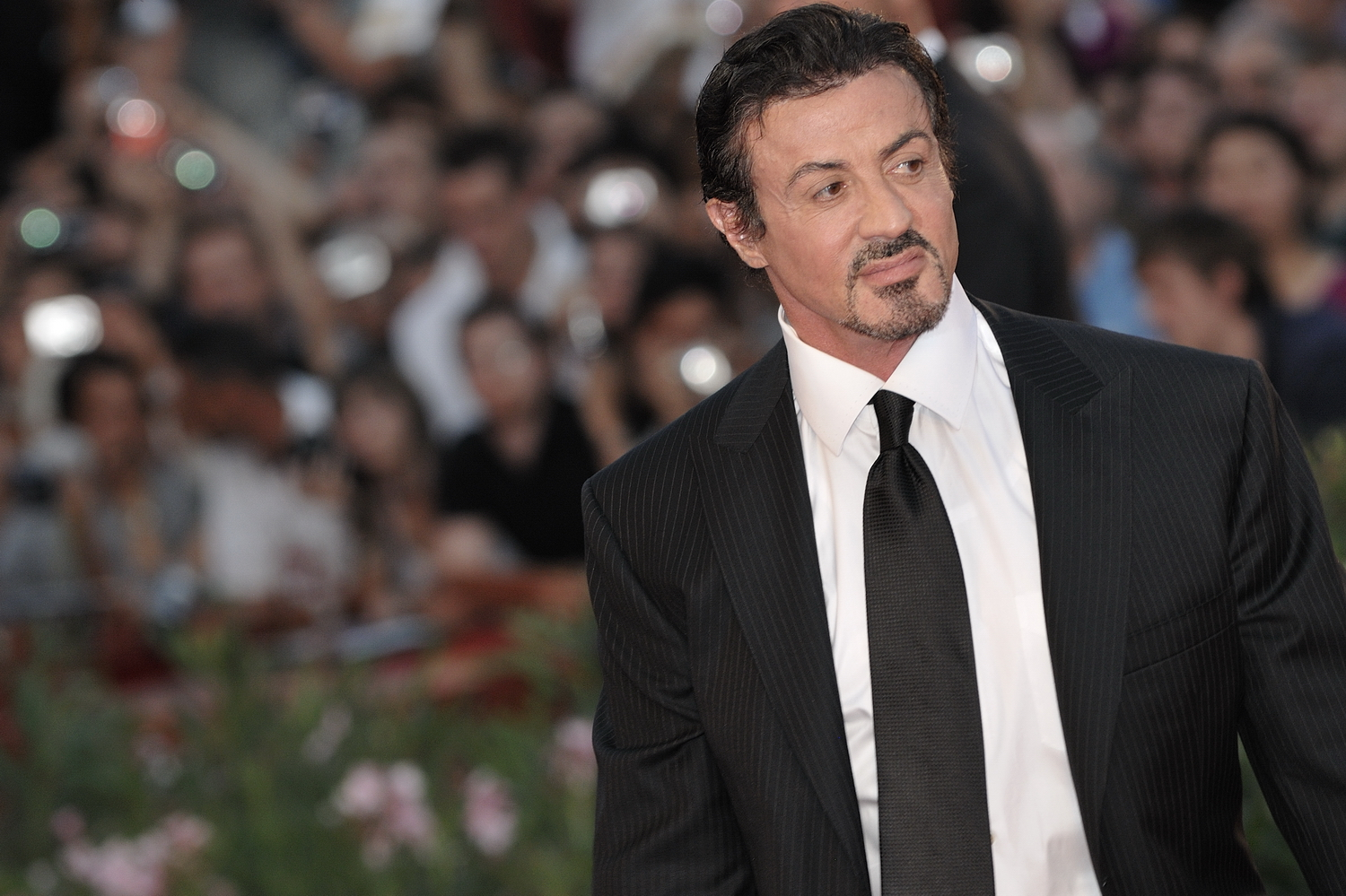 66ème Festival du Cinéma de Venise (Mostra), 11ème jour (12/09/2009) Tapis rouge pour la soirée de cloture du Festival de Venise 2009 Sylvester Stallone